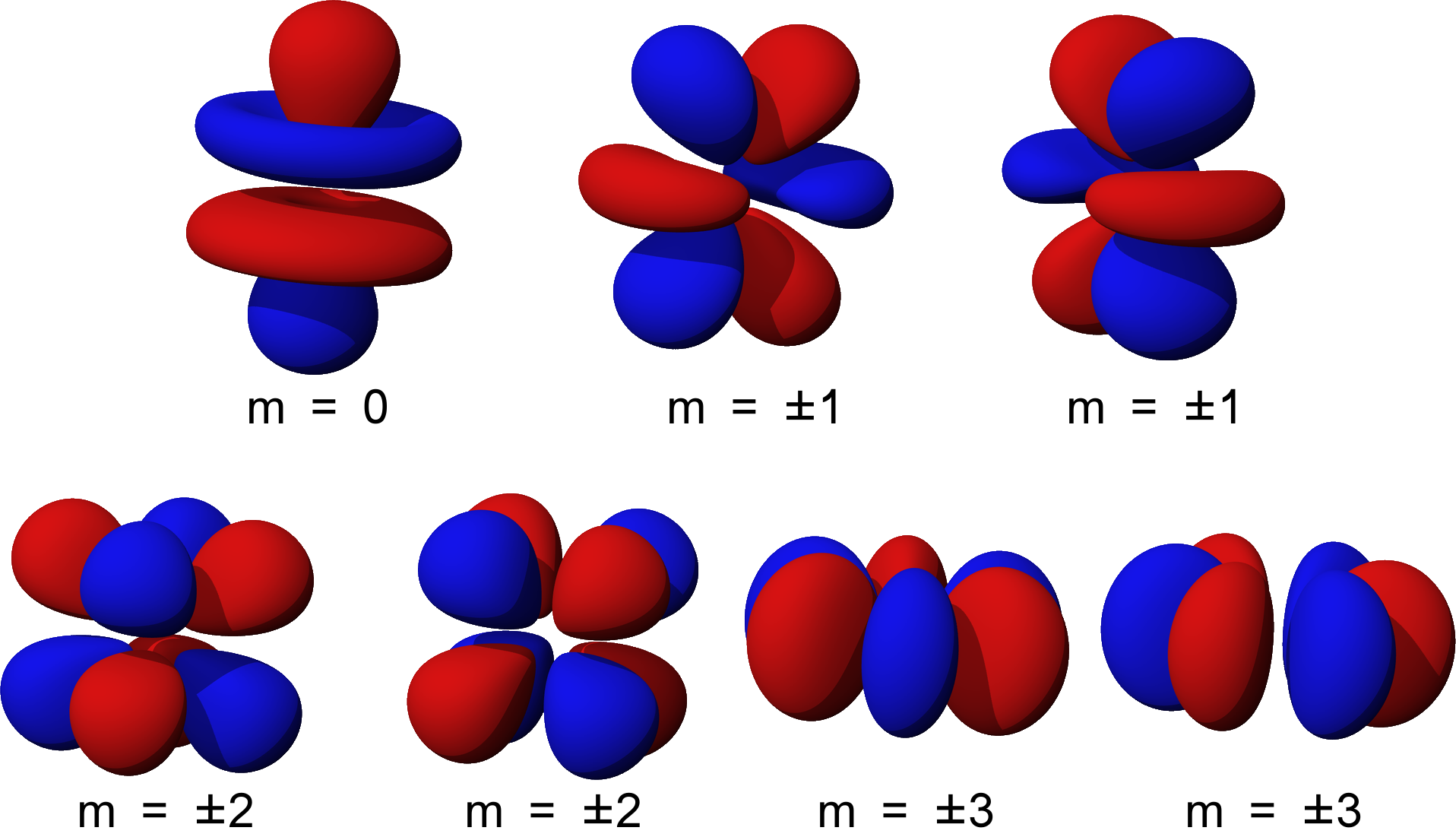 Atomic electron orbitals created with "orbital viewer" and labelled with m-quantum numbers they consist of. Except for m=0 they are different superpositions with equal contributions of ±m.This file was derived from: F orbital.png